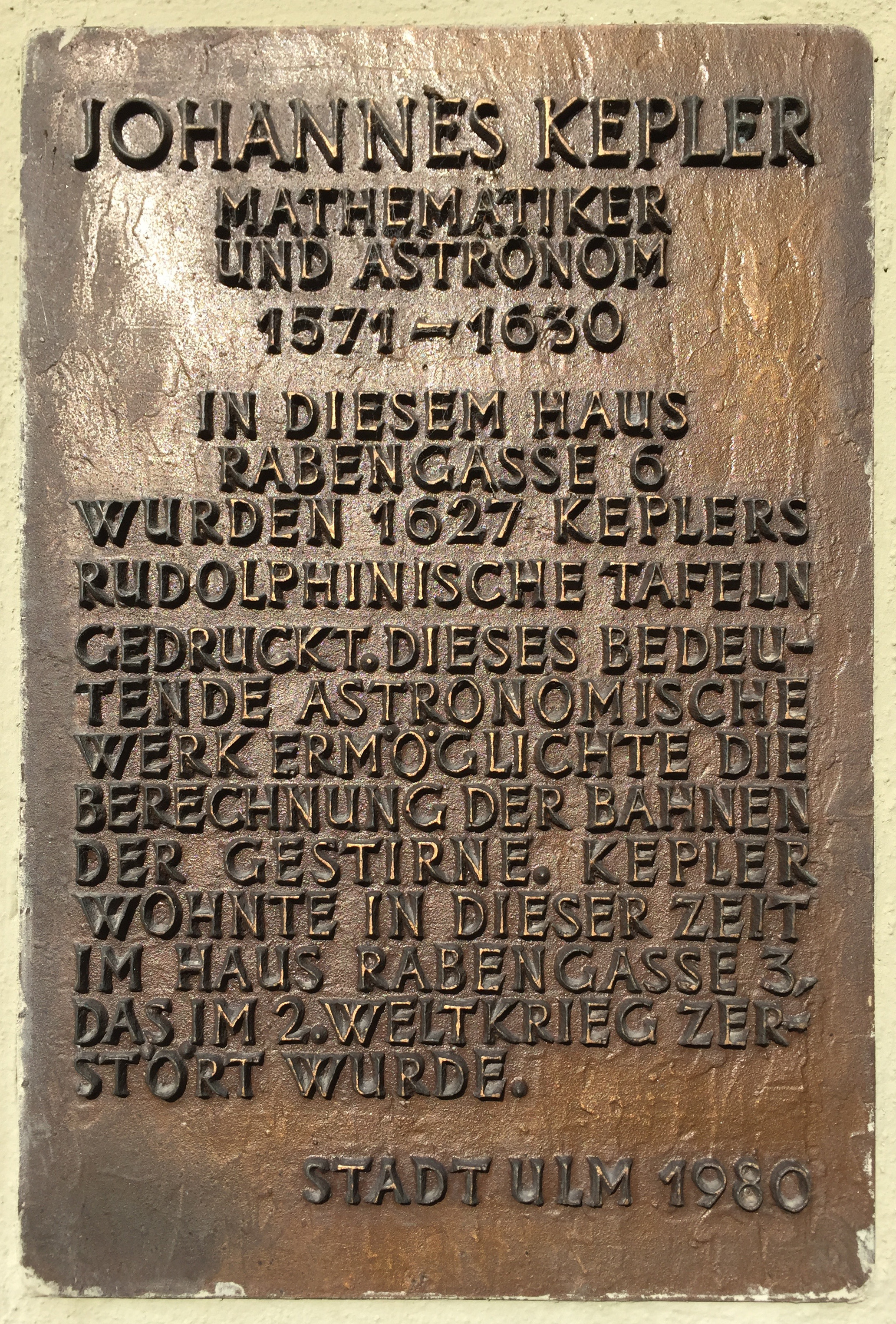 The memorial tablet of the print office commissioned by Johannes Kepler to print the Rudolphine Tables